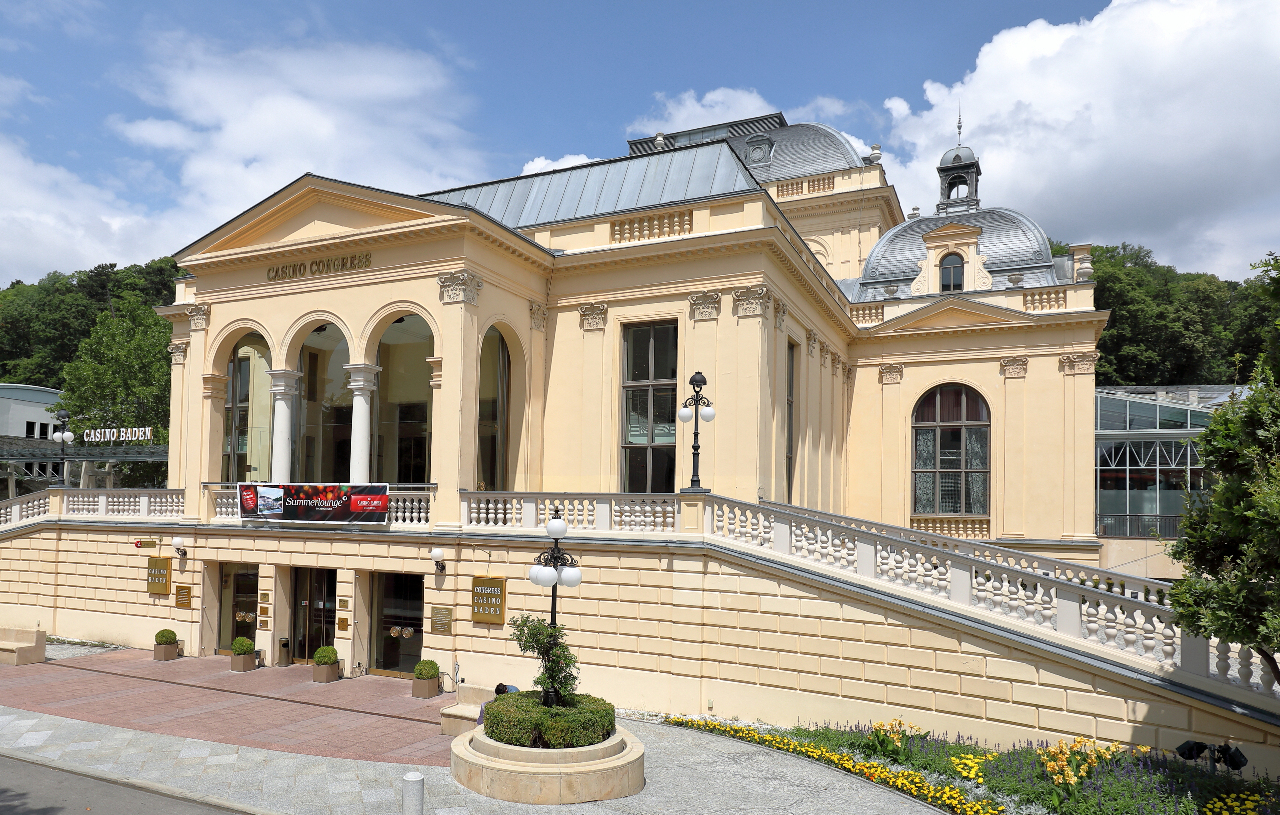 Das ehemalige Kurhaus und jetzige Casino sowie Kongress- und Veranstaltungszentrum an der Adresse Kaiser-Franz-Ring 1 in der niederösterreichischen Stadt Baden.Das Bauwerk im Stil der Neorenaissance wurde ab 1884 nach Plänen der Architekten Eugen Fassbender und Maximilian Katscher (1858–1917) errichtet und am 10. Juni 1886 feierlich als neues Kurhaus eröffnet. Am 12. April 1934 wurde im Kurhaus das Badener Casino als erster Ganzjahresbetrieb Österreichs der damaligen Österreichischen Casino A. G. eröffnet. Nach einem großen Umbau ab 1992 fand im März 1995 die Eröffnung als größtes Casino Europas samt Kongress- und Veranstaltungszentrum statt.